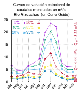 Curvas de variación estacional del río Vizcachas en Cerro Guido. # Dirección General de Aguas # Diagnóstico y clasificación de los cursos y cuerpos de agua según objetivos de calidad. Cuenca del río Serrano. # Santiago de Chile # Ministerio de Obras Públicas (Chile) # 2004 # url: # urlarchivo: # Tabla 4.3: Río Vizcachas en cerro Guido (m3/s), pág. 26 mes 5% 10% 20% 50% 85% 95% abr 6.652 5.100 3.794 2.378 1.628 1.425 may 4.711 4.066 3.402 2.419 1.589 1.242 jun 4.505 4.031 3.523 2.723 1.983 1.646 jul 6.613 5.949 5.195 3.924 2.666 2.074 ago 7.656 6.350 5.063 3.284 1.927 1.409 sep 9.494 7.117 5.171 3.149 2.144 1.888 oct 19.868 16.823 13.753 9.356 5.822 4.406 nov 23.629 20.448 17.040 11.674 6.705 4.441 dic 22.274 16.137 11.114 5.892 3.296 2.635 ene 7.655 6.450 5.241 3.525 2.163 1.623 feb 6.241 5.061 3.927 2.418 1.330 0.936 mar 6.080 5.034 4.005 2.588 1.511 1.101 This plot was created with Gnuplot.